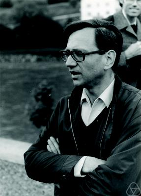 Hans-Georg Kellerer 1976 in Burghausen